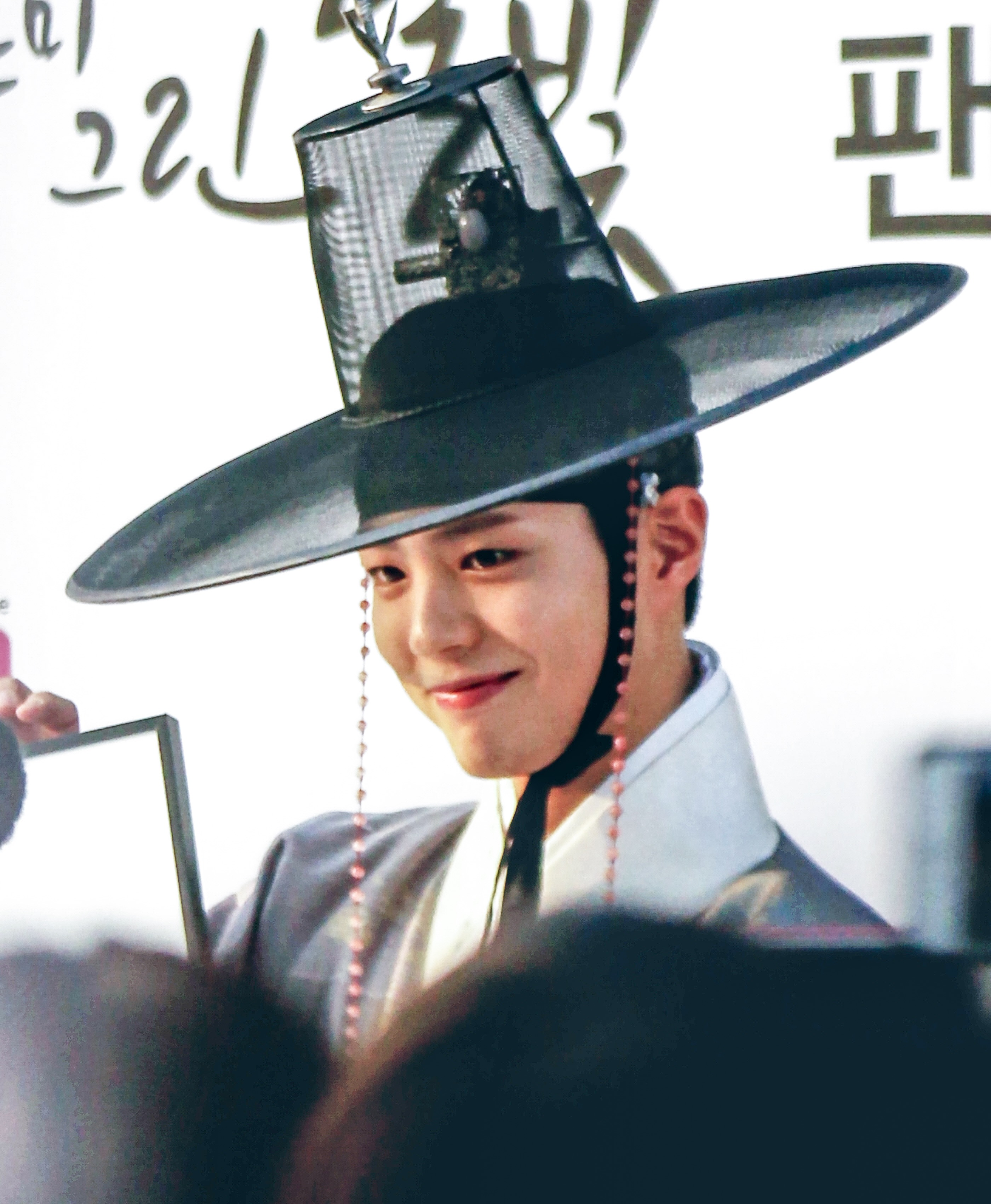 161019 구르미 그린 달빛 팬사인회